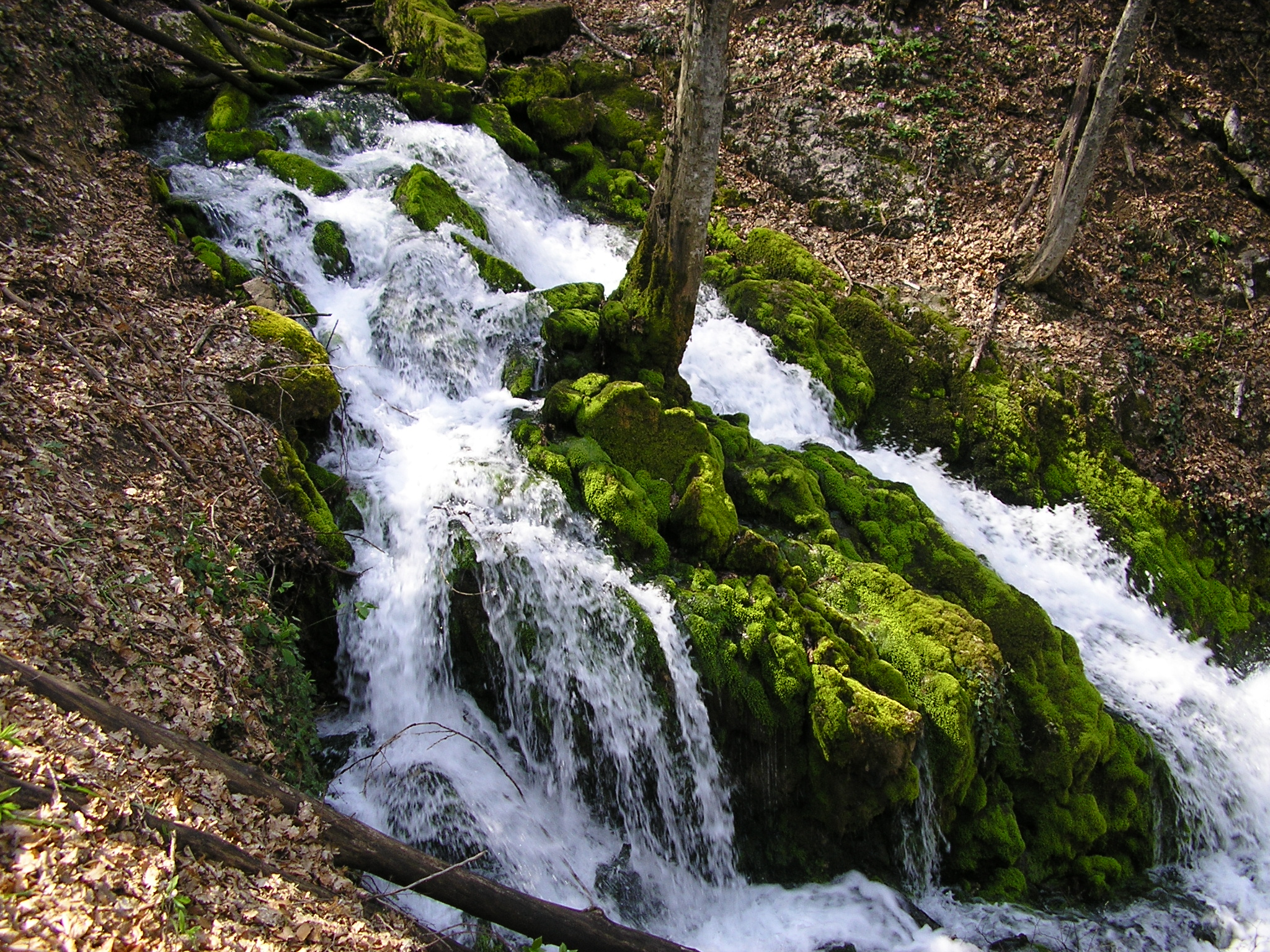 Источник Пания, Большой каньон, Крым – крупнейший (370 л/с) карстовый источник Крыма. Впервые исследован и описан Н. В. Рухловым в 1915 г.